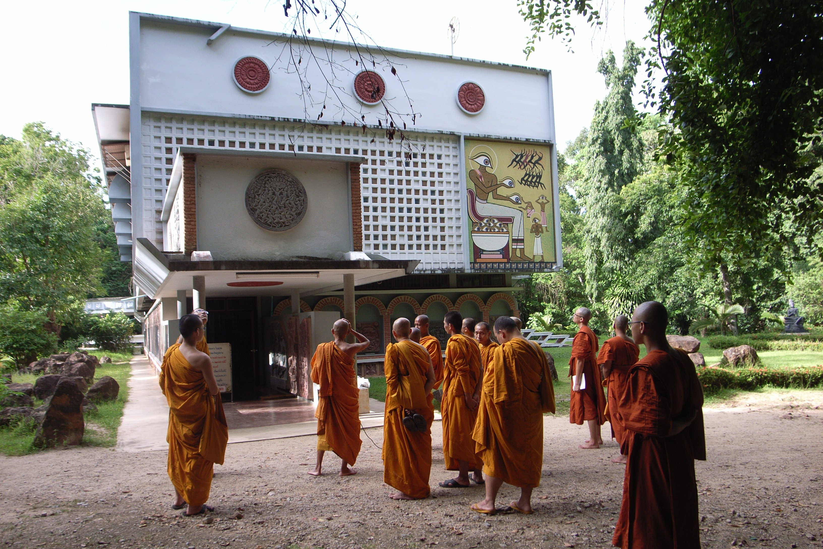 "Spiritual Theater" at Suan Mokkh